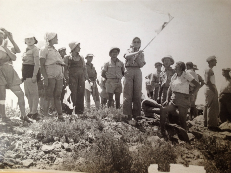 מאותת עם דגל בעליה למעלה החמישה, תמר אשל במרכז, מקשרת בין היישוב לירושלים, קיץ 1938